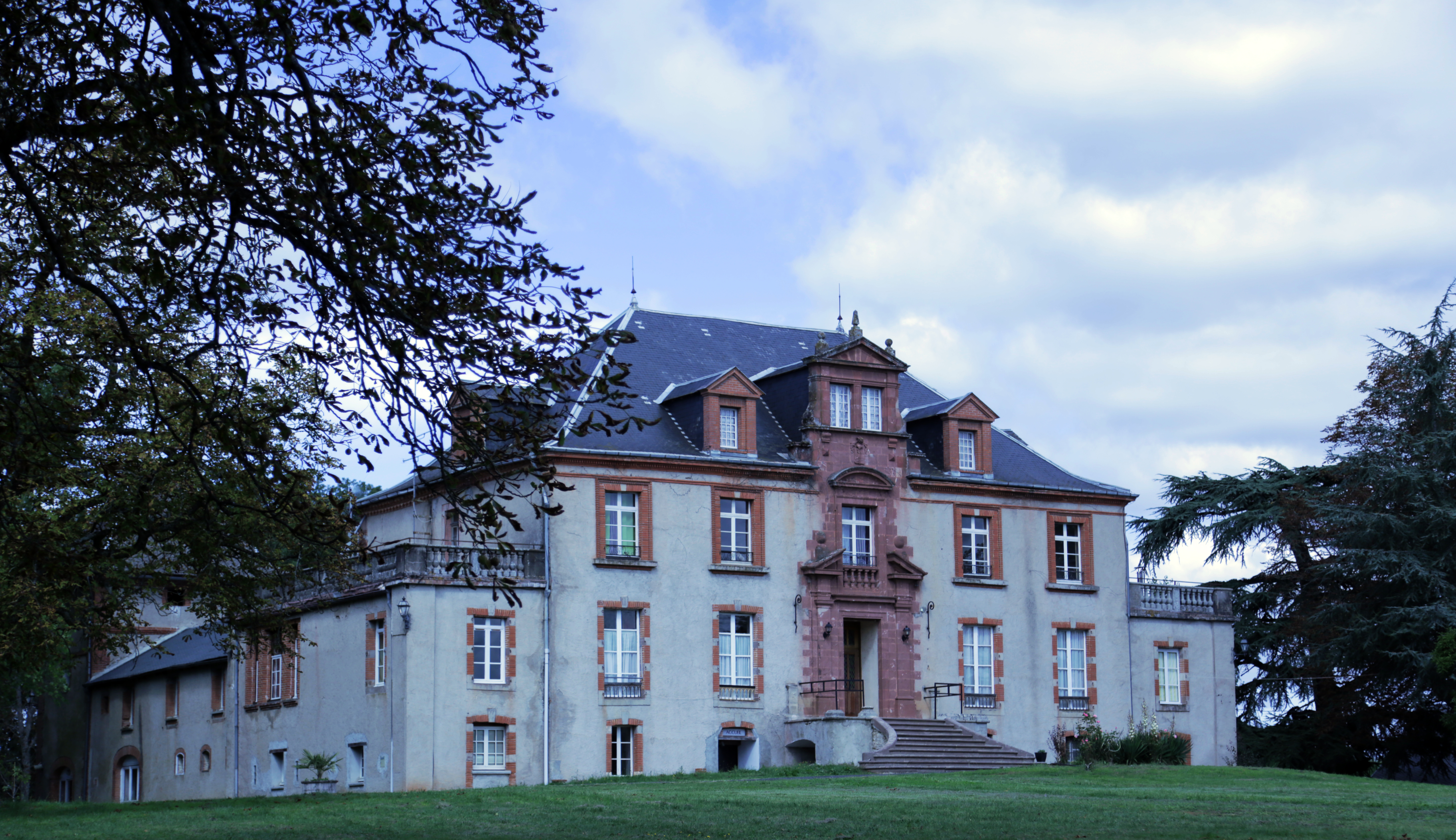 Château de la Gautherie - Château Dms Debah